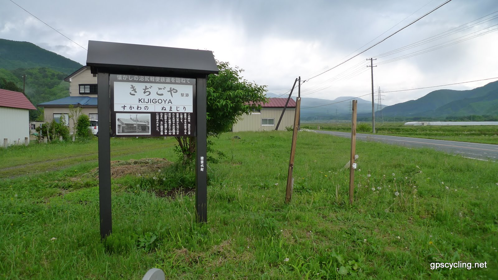 沼尻軽便鉄道木地小屋駅跡